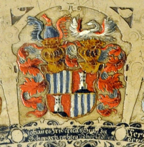 Passauer Liedertisch, 1590; Sammlung alter Musikinstrumente (in der Neuen Burg), Kunsthistorisches Museum, Wien Wappen der Passauer Domkapitulare Johannes Fridericus Graf zu Schwartzenberg und ho[en]la[n]dtsberg (Schwarzenberg und Hohenlandsberg)